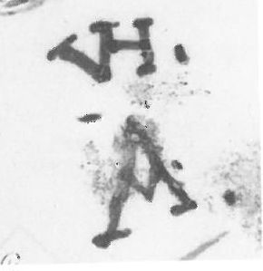 Porzellanmarke der Manufaktur von Horn in Braunschweig (1707–1723)